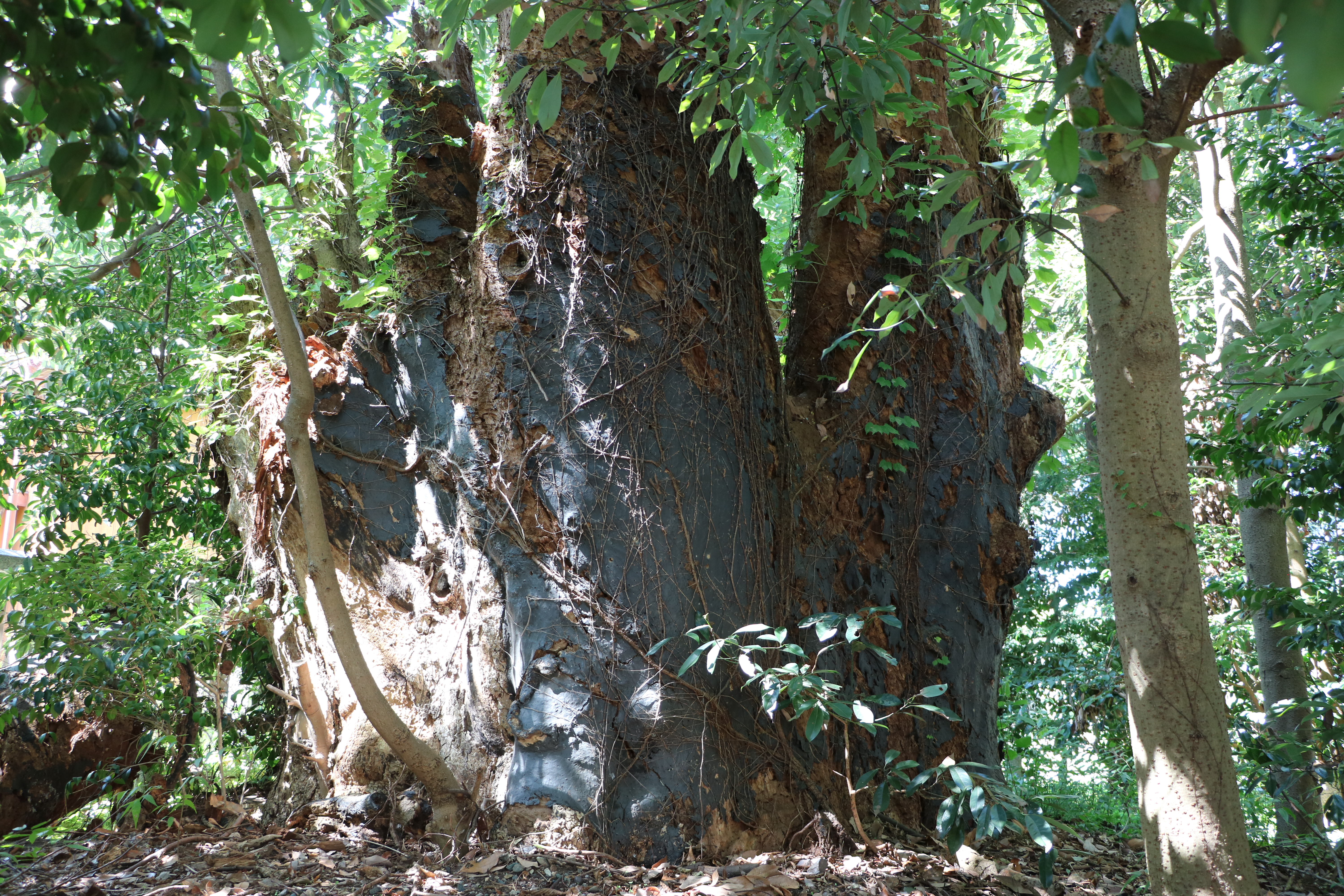 国指定天然記念物が解除された小浜神社の九本ダモの枯死した株（福井県小浜市）。